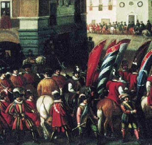 Giovanni Ferri, detto Giovanni senese, (attribuito) - Particolare del Corteo del Prefetto di Roma Taddeo Barberini nel rione Ponte (c. 1640). Olio su tela, cm 33 x 121. Il corteo raffigurato si svolse nel 1631. Al centro, in abito scuro e gorgiera, il duca Giovan Giorgio Cesarini (1590-1635), gonfaloniere del Popolo romano.